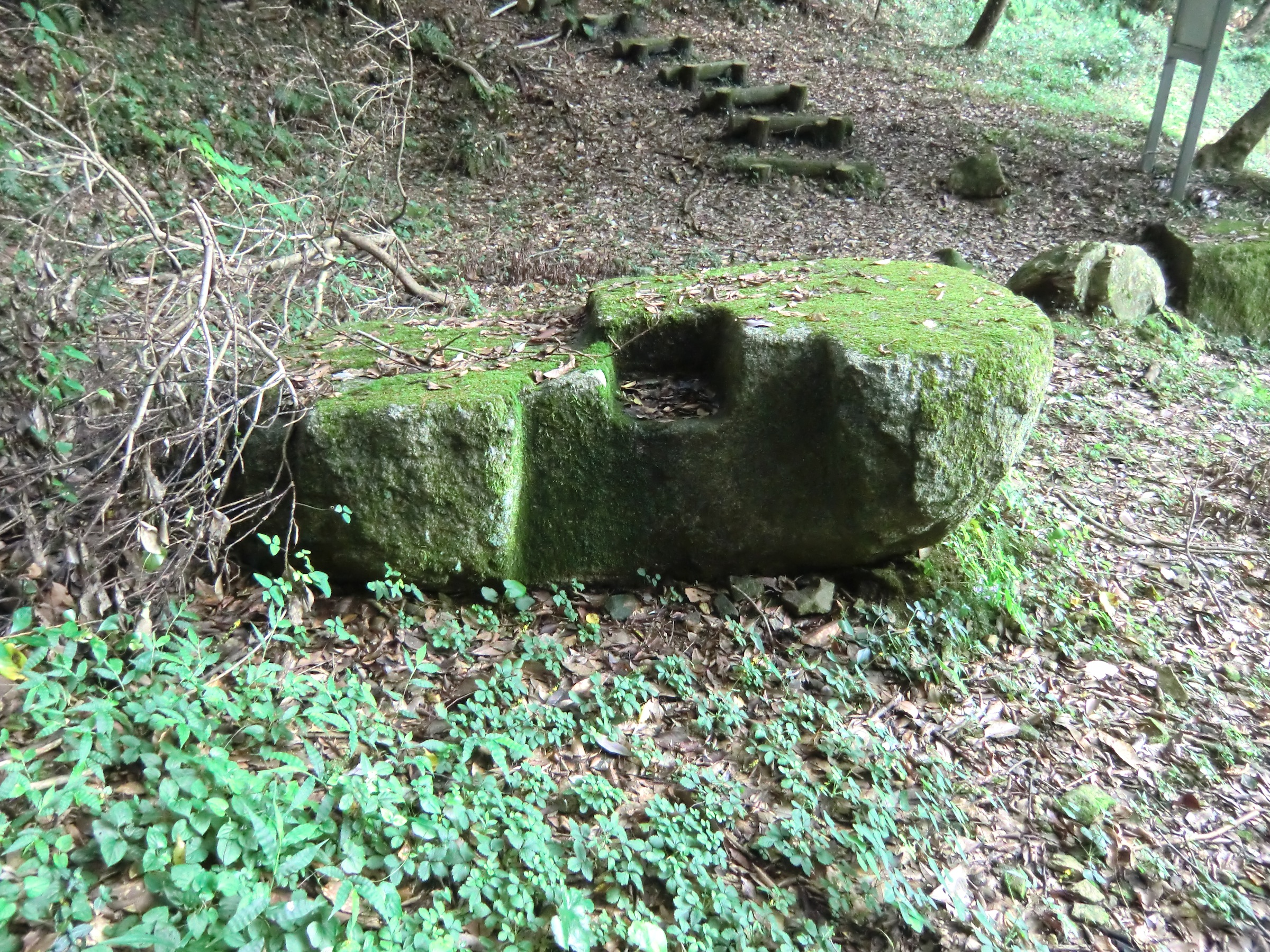 石城山神籠石（光市）の北門跡にある沓石